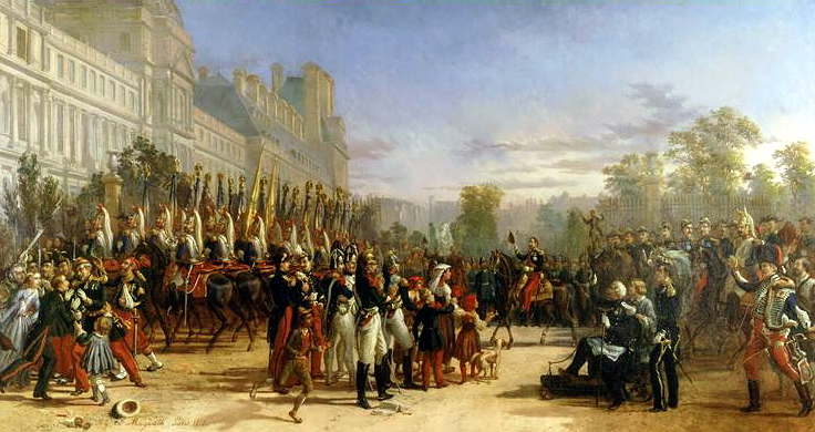 Retour de Napoléon III aprés la Campagne d'Italie (1859)